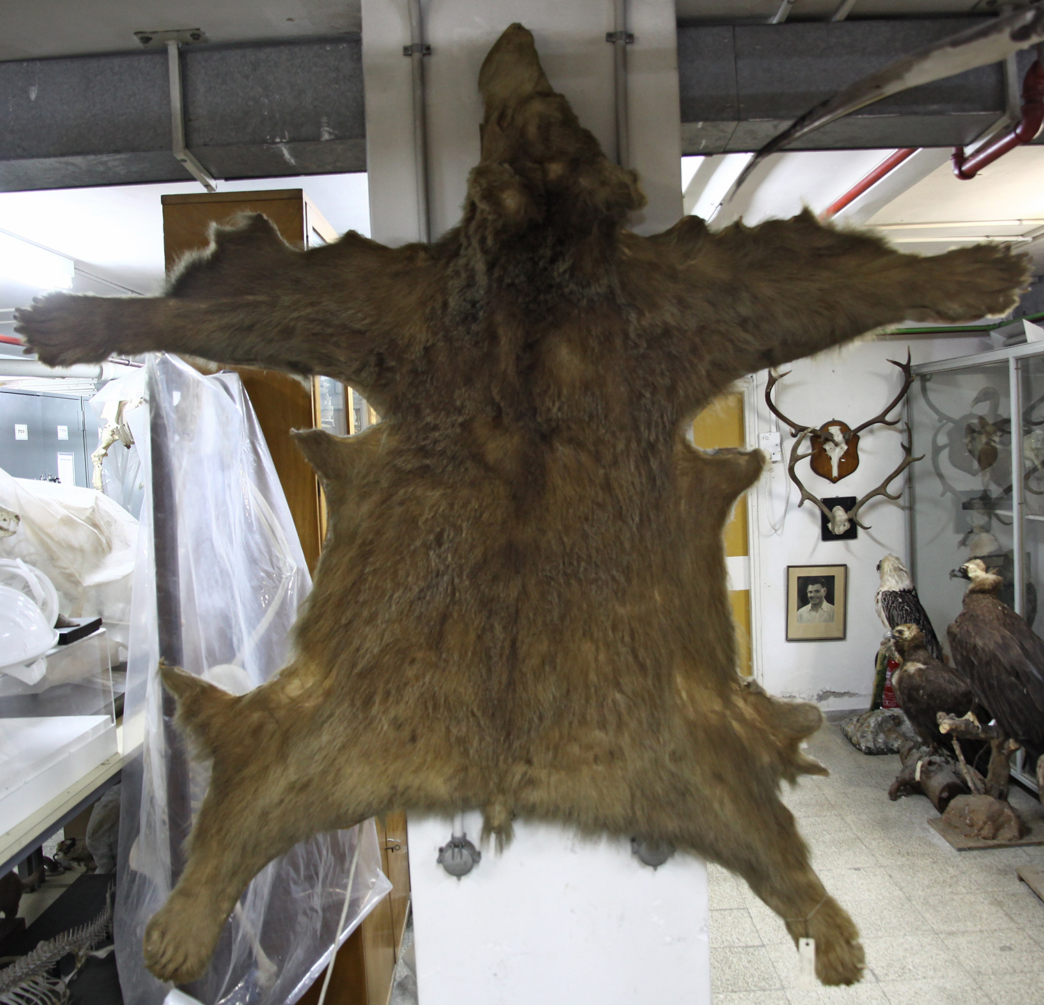 הדוב הסורי האחרון שנוצד בישראל על ידי ישראל אהרוני